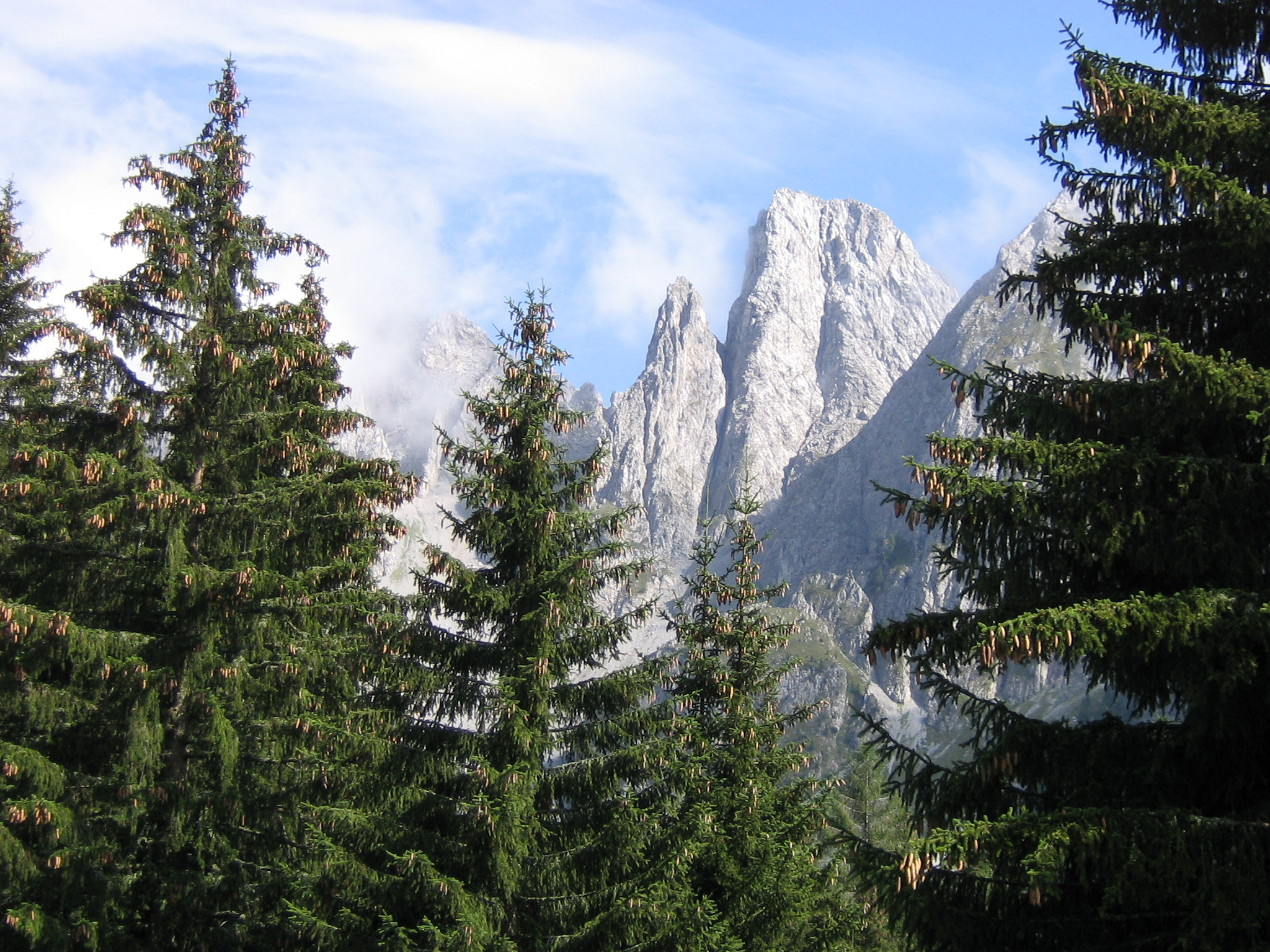 Cimone della Bagozza (2407 m).